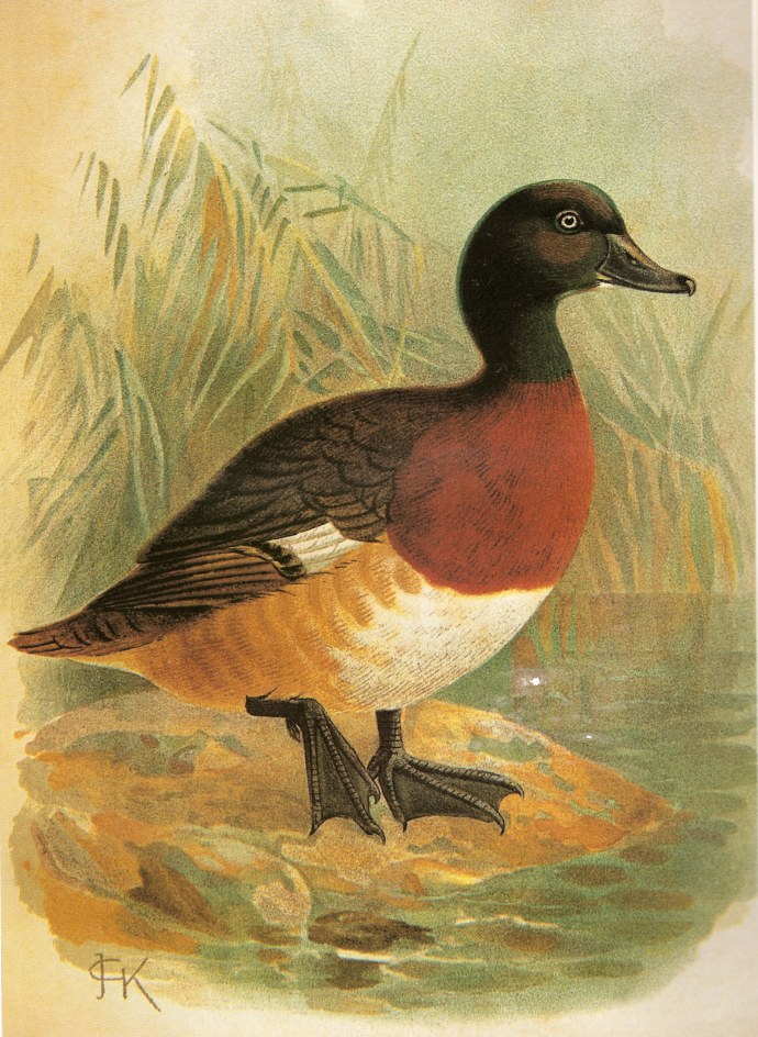 Baer's Pochard Aythya baeri (Radde)